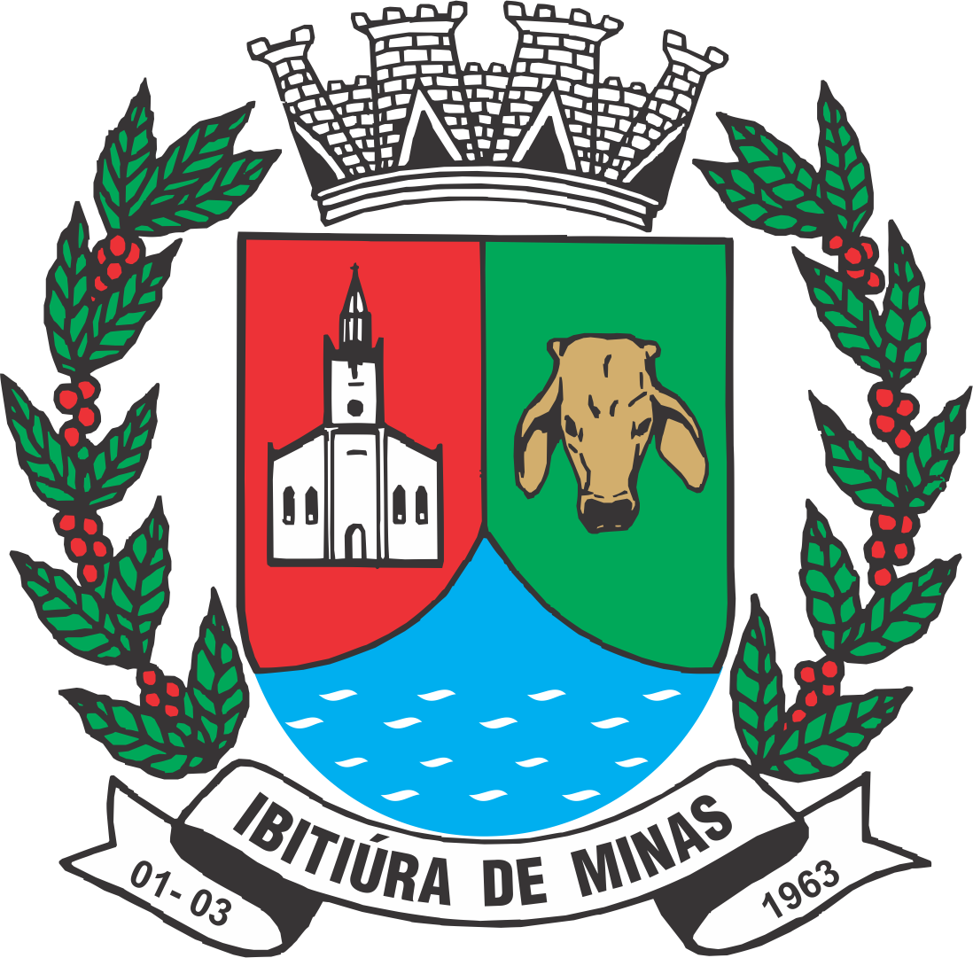 Brasão de armas do município de Ibitiúra de Minas, Minas Gerais, Brasil.